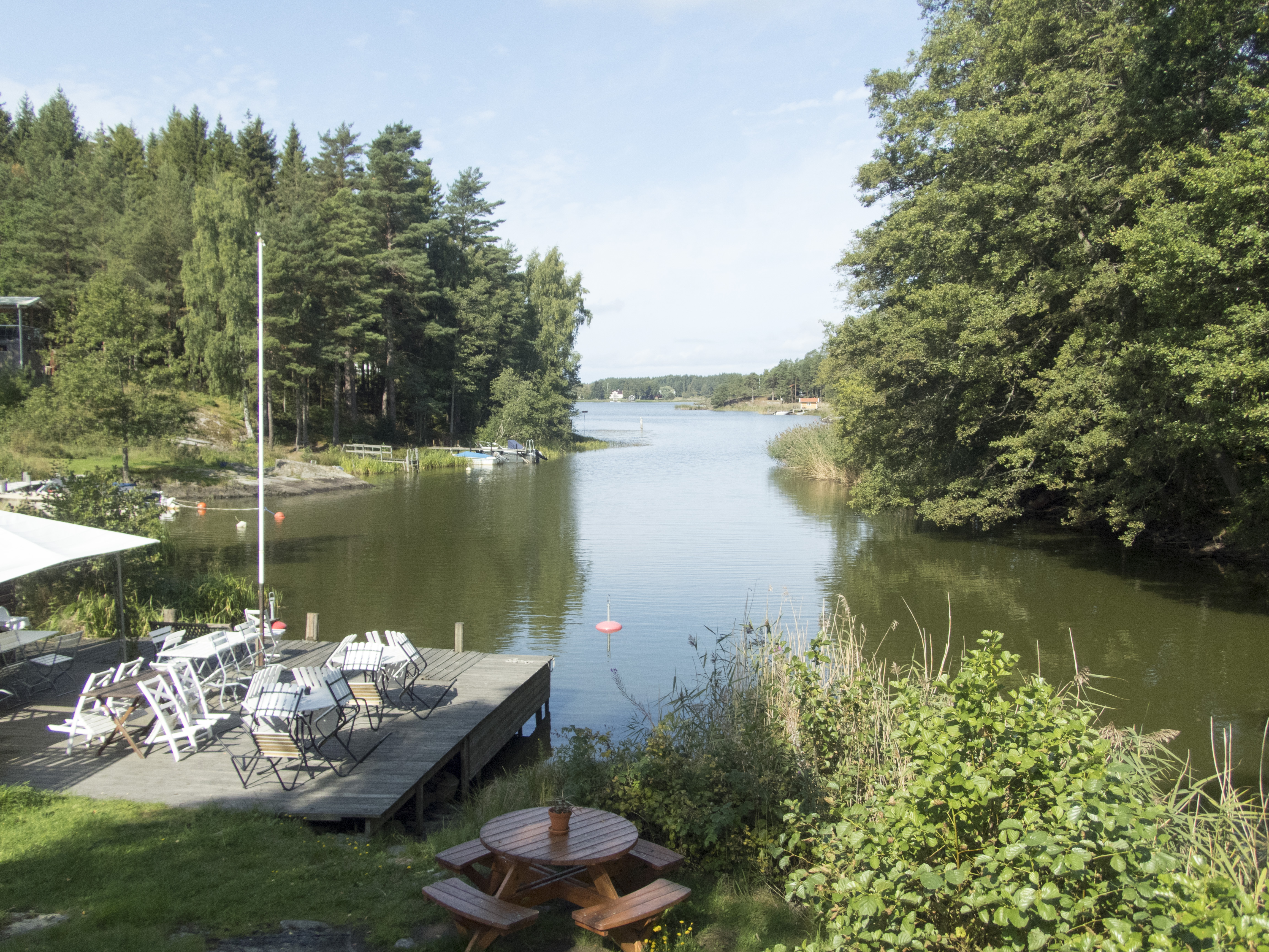 Ullersund, Kålland